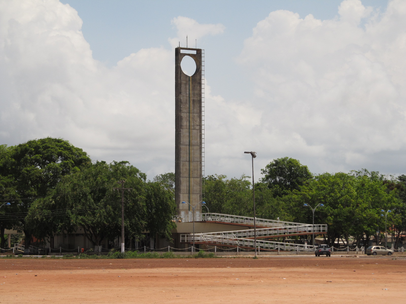 Equator Line Monument, Macapa, Brazil (7)